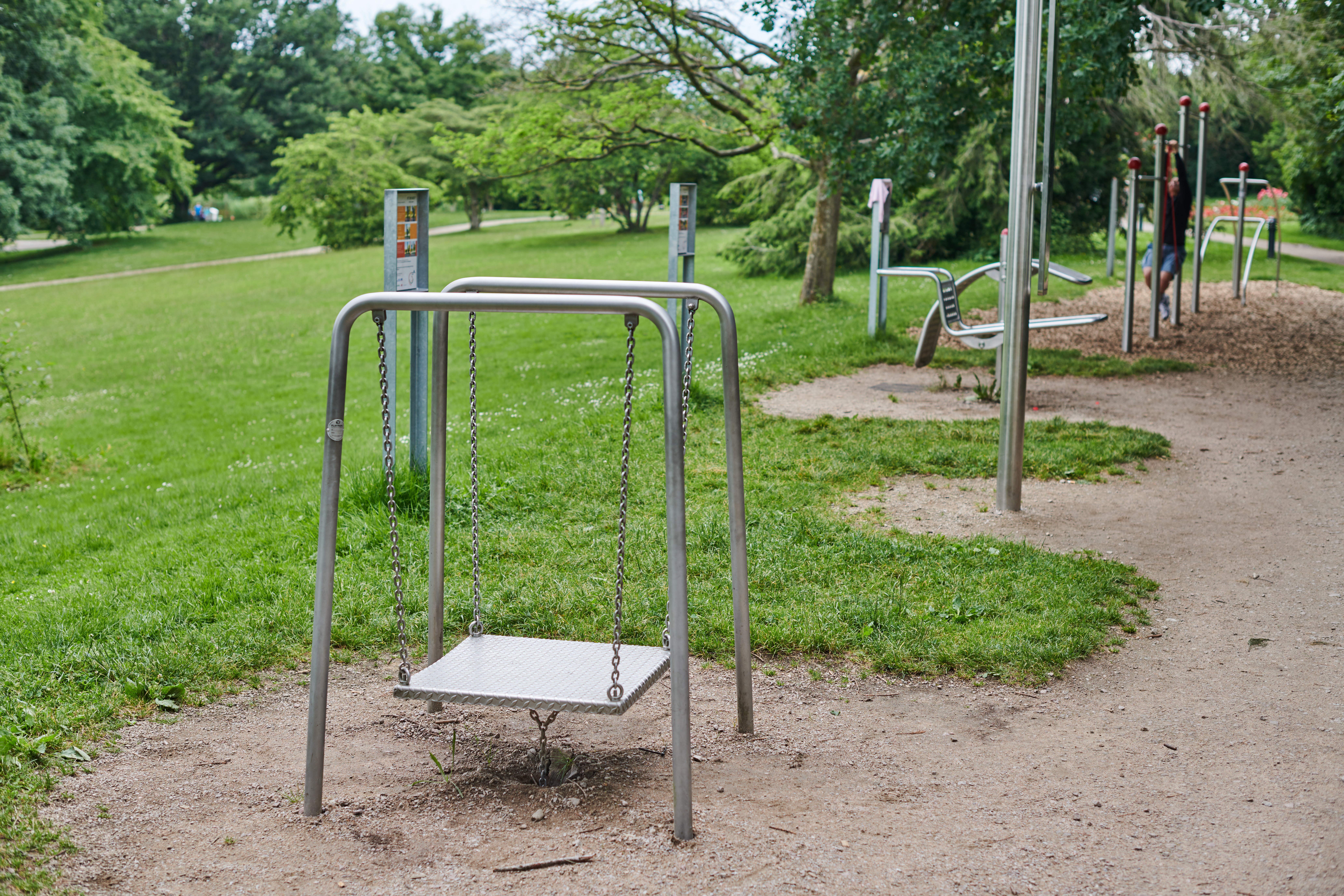 Landschaftspark Grütt Lörrach: Bewegungsparcours "Fit im Grütt"